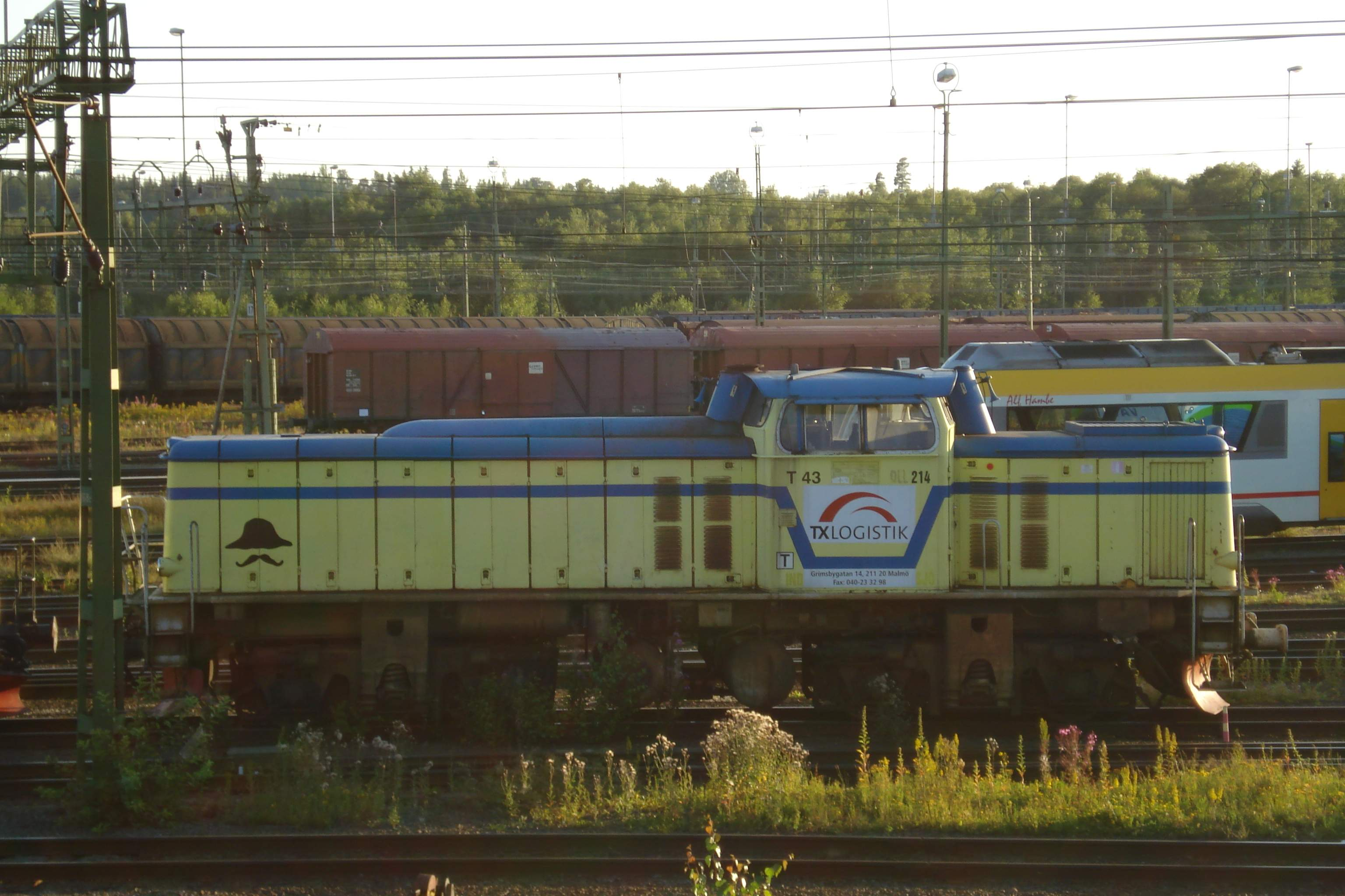 TX Logistiks T43 214 (Banverkets målning med TX logistik-logga) utanför lokstallet i Nässjö 2007-08-05